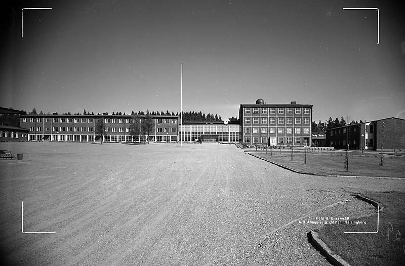 Byggnadsverk; Skola; Utbildning och vetenskap